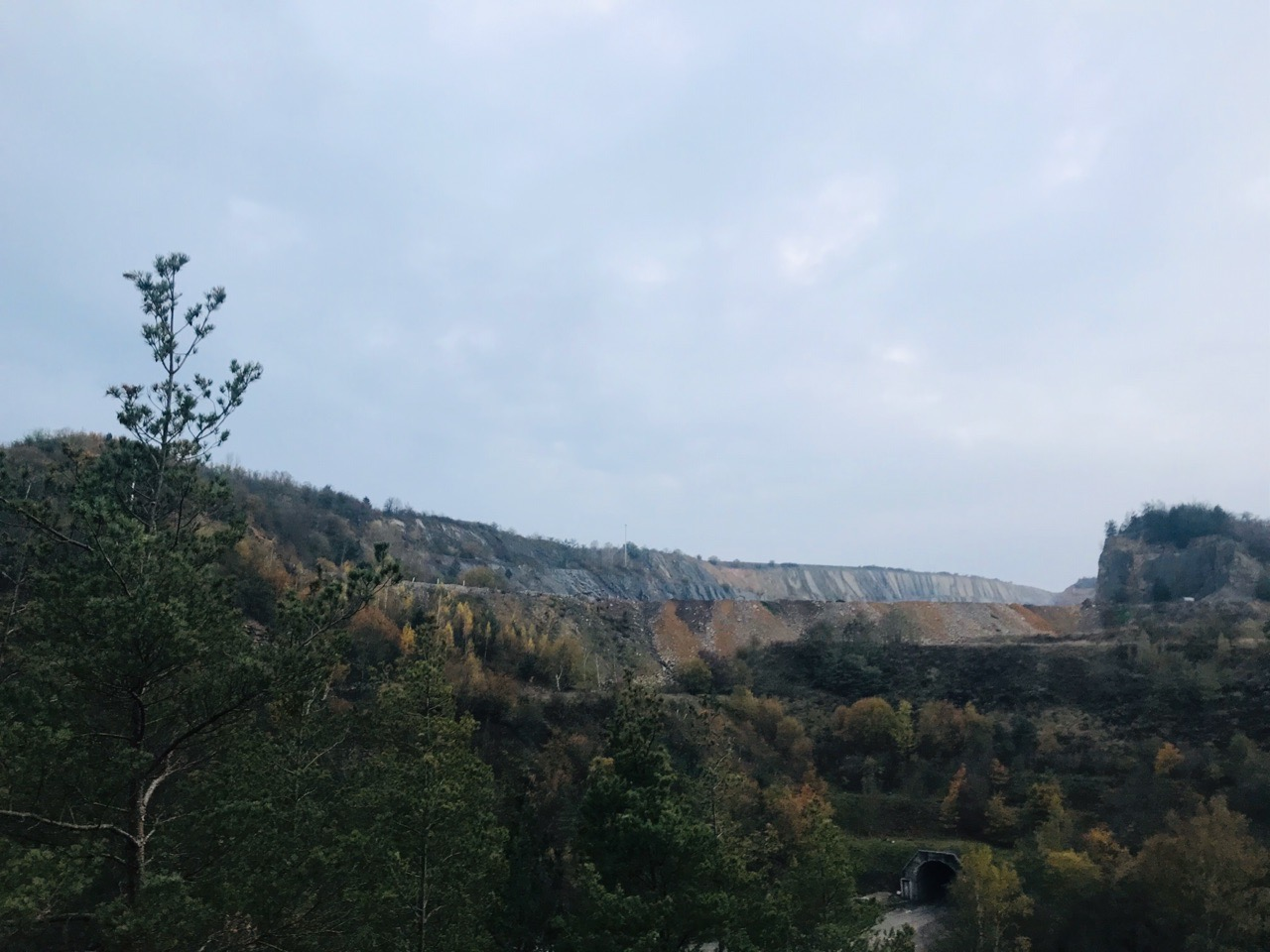 výhled z výšky na pp Hvížďalka